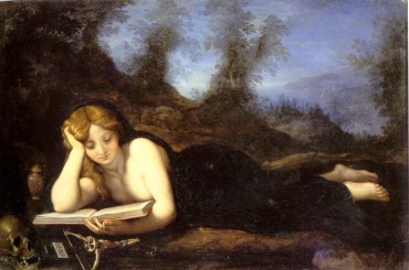 Maddalena leggente, h/cuivre